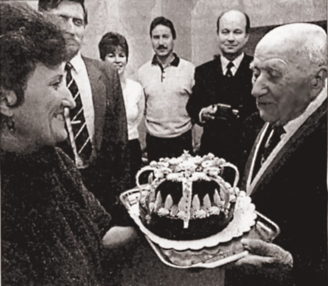 Olomoučtí cukráři přejí Josefu Štaflovi k 90. narozeninám